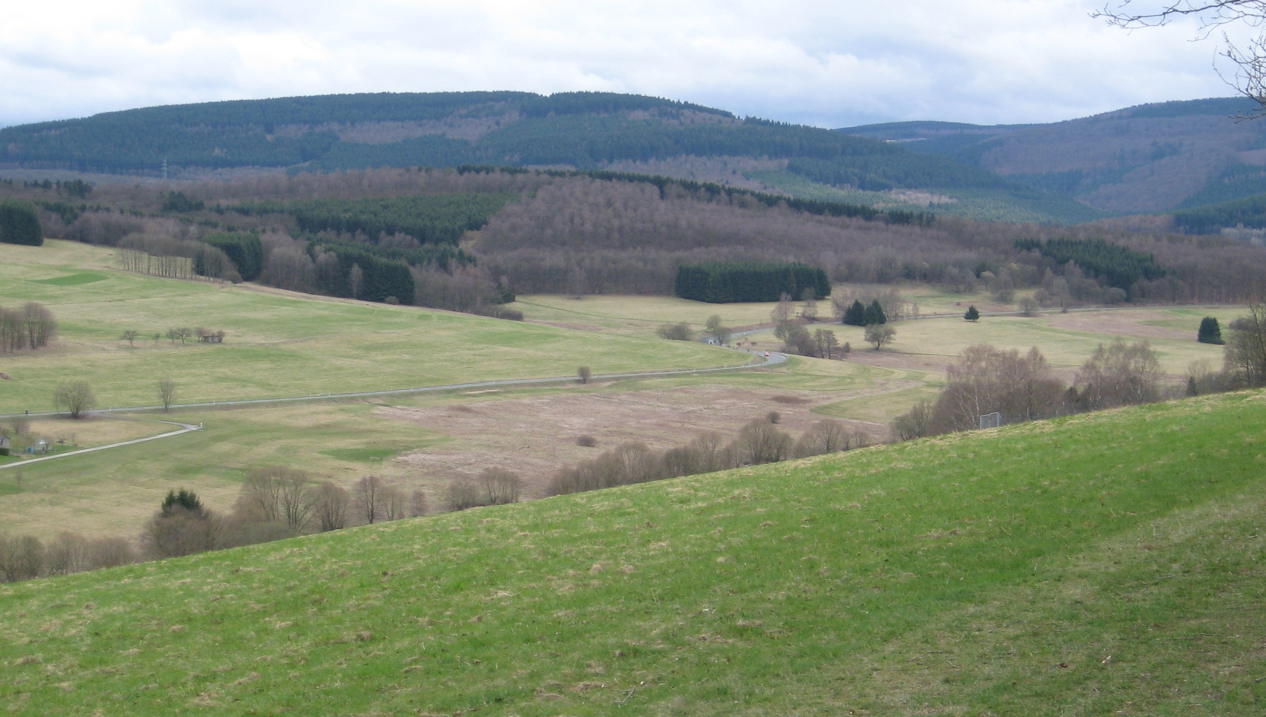 Das Gilsbachtal in Richtung Wahlbach (Südwest).